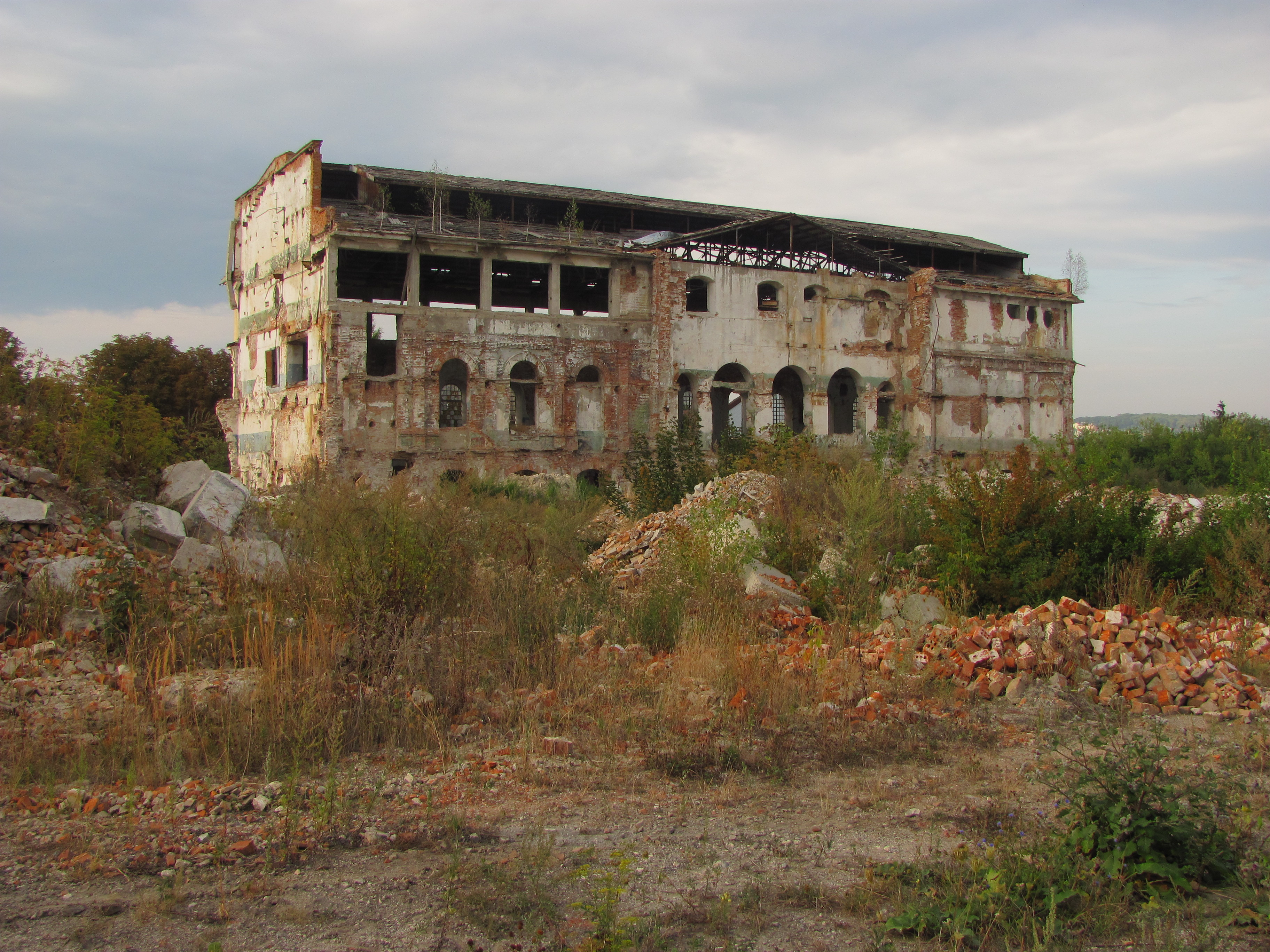 Сучасний вигляд головної споруди Сатанівського цукрового заводу